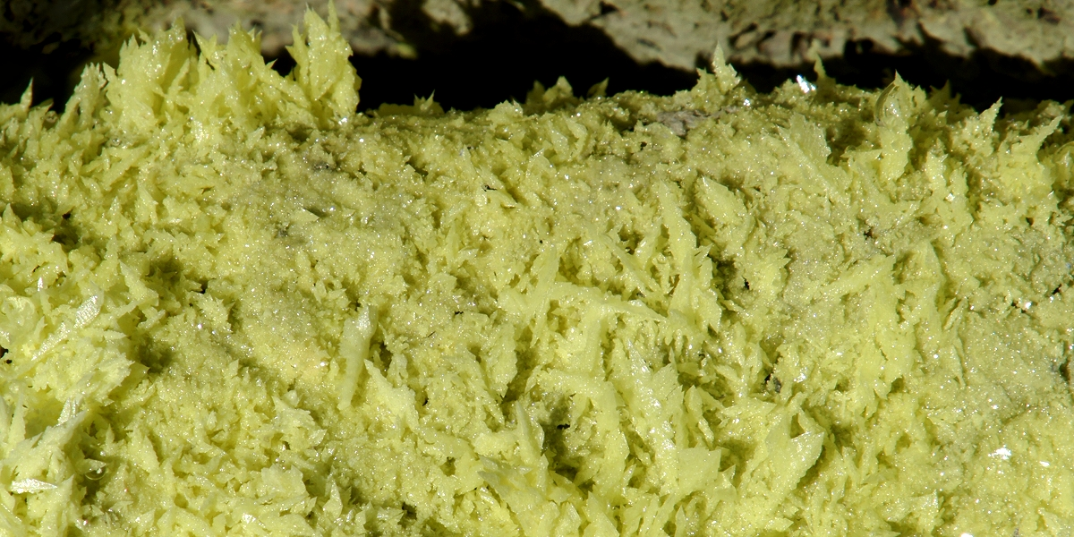 Самороданая сера на вулкане Килауэа